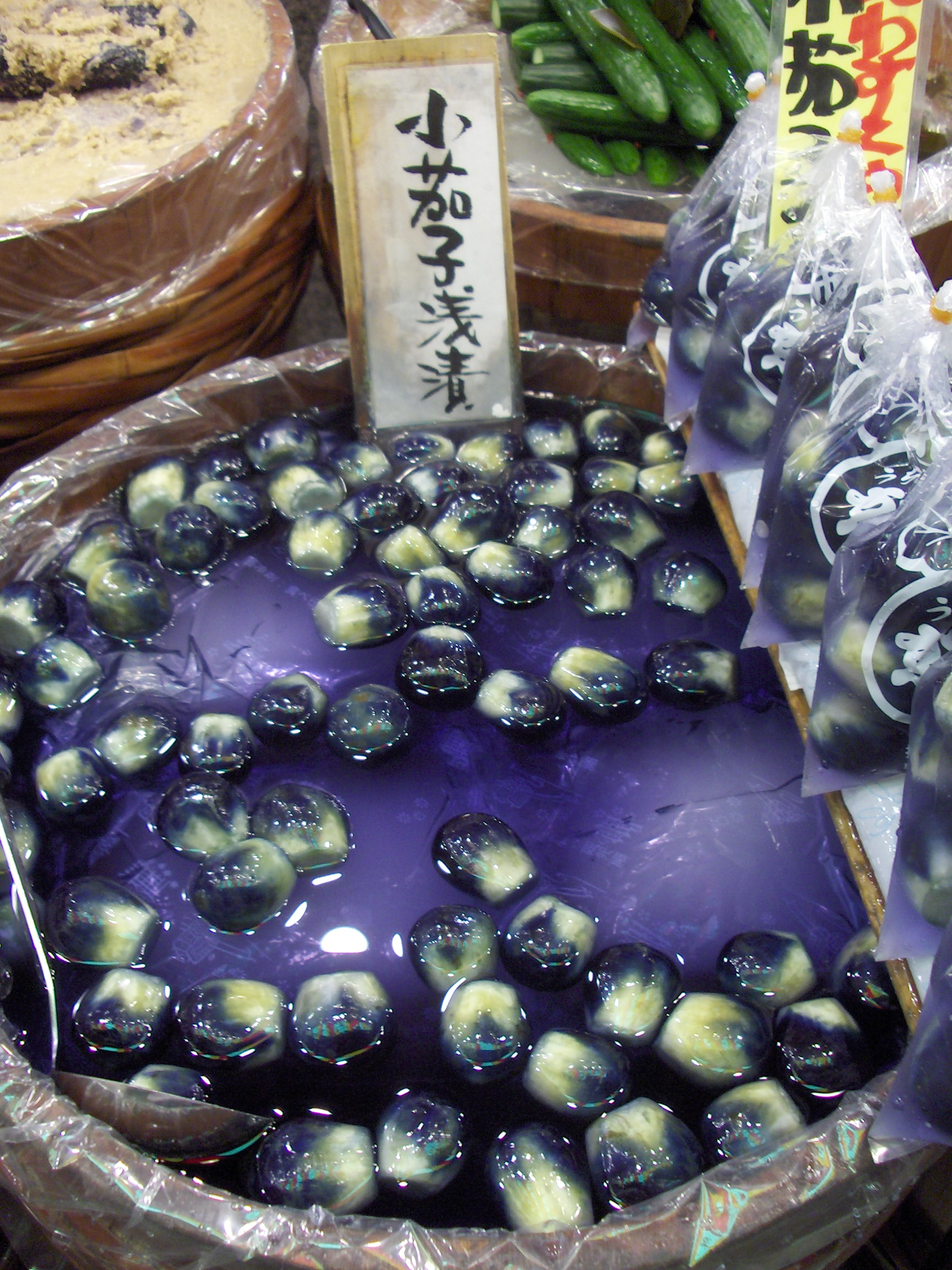 nishiki food market, kyoto, pickled vegetables (eggplant)HPIM0597